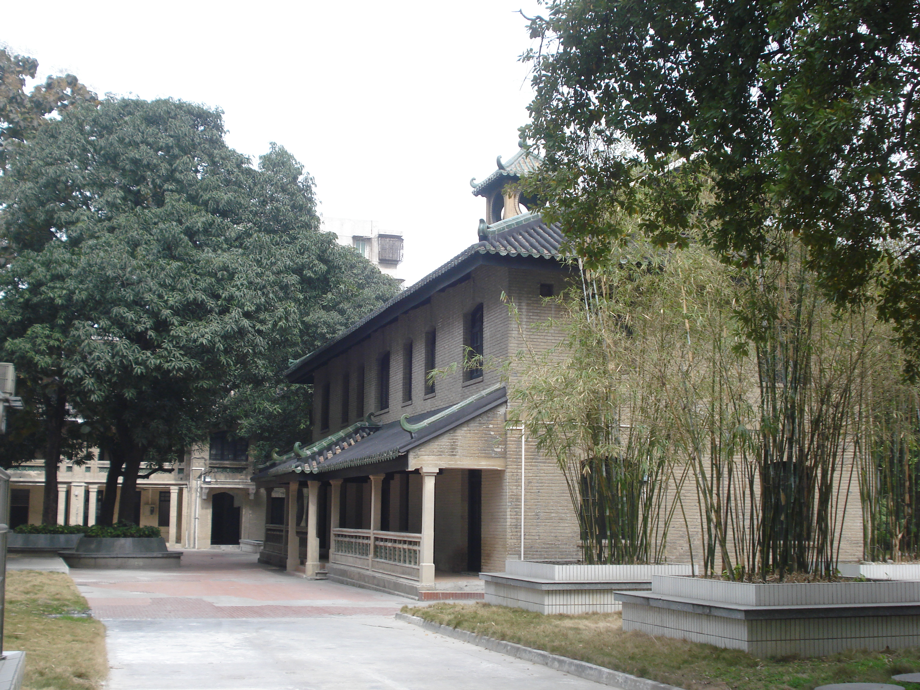 佛山一中钟楼与旧教学楼